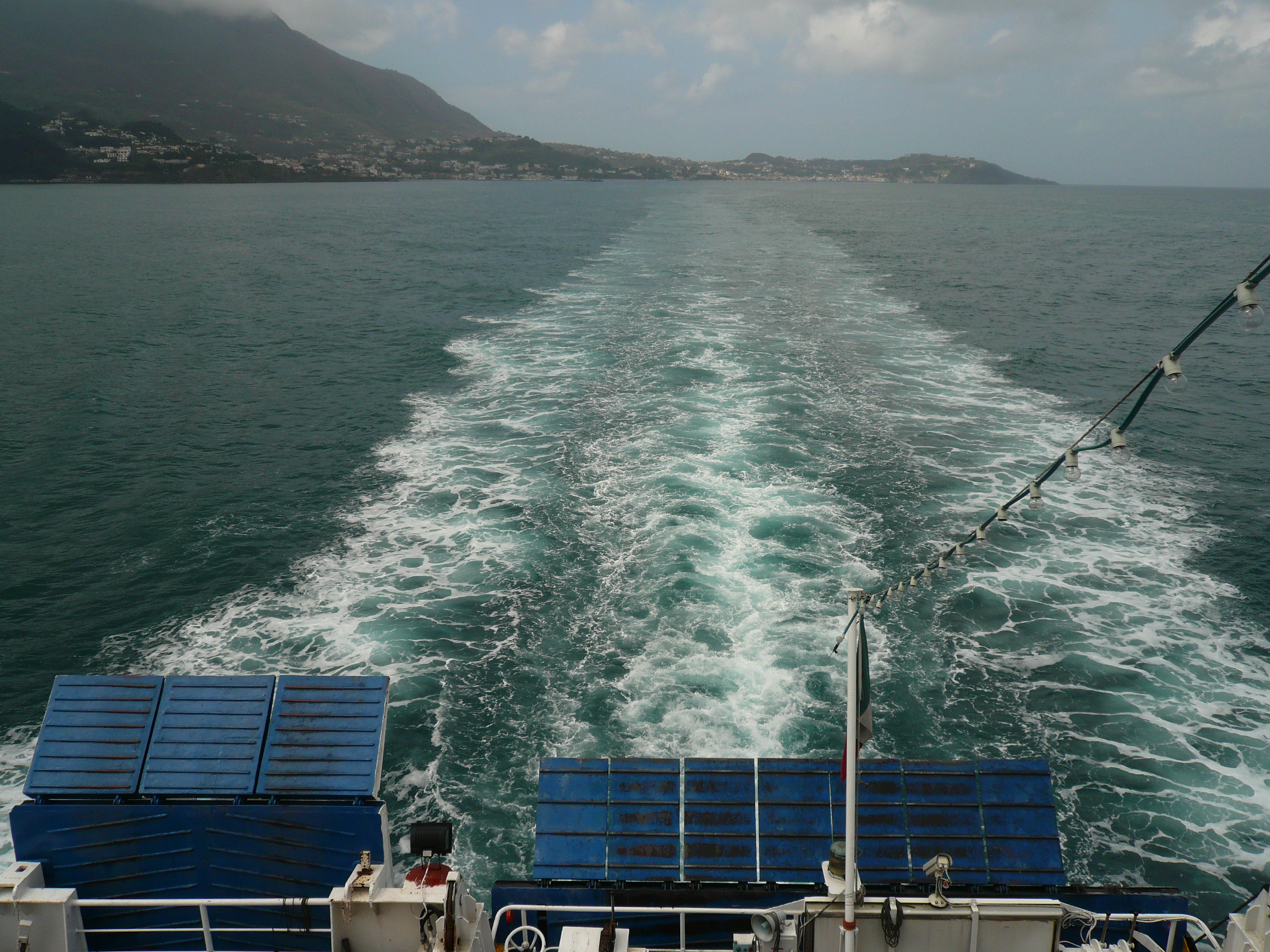 scia lasciata dal traghetto partito da Casamicciola Terme (isola d'Ischia) e diretto a Pozzuoli. Autore foto: Roberto De Martino